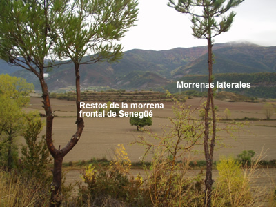 Imagen en la que se identifican las morrenas del Valle de Tena a la altura de Senegüé (Huesca)